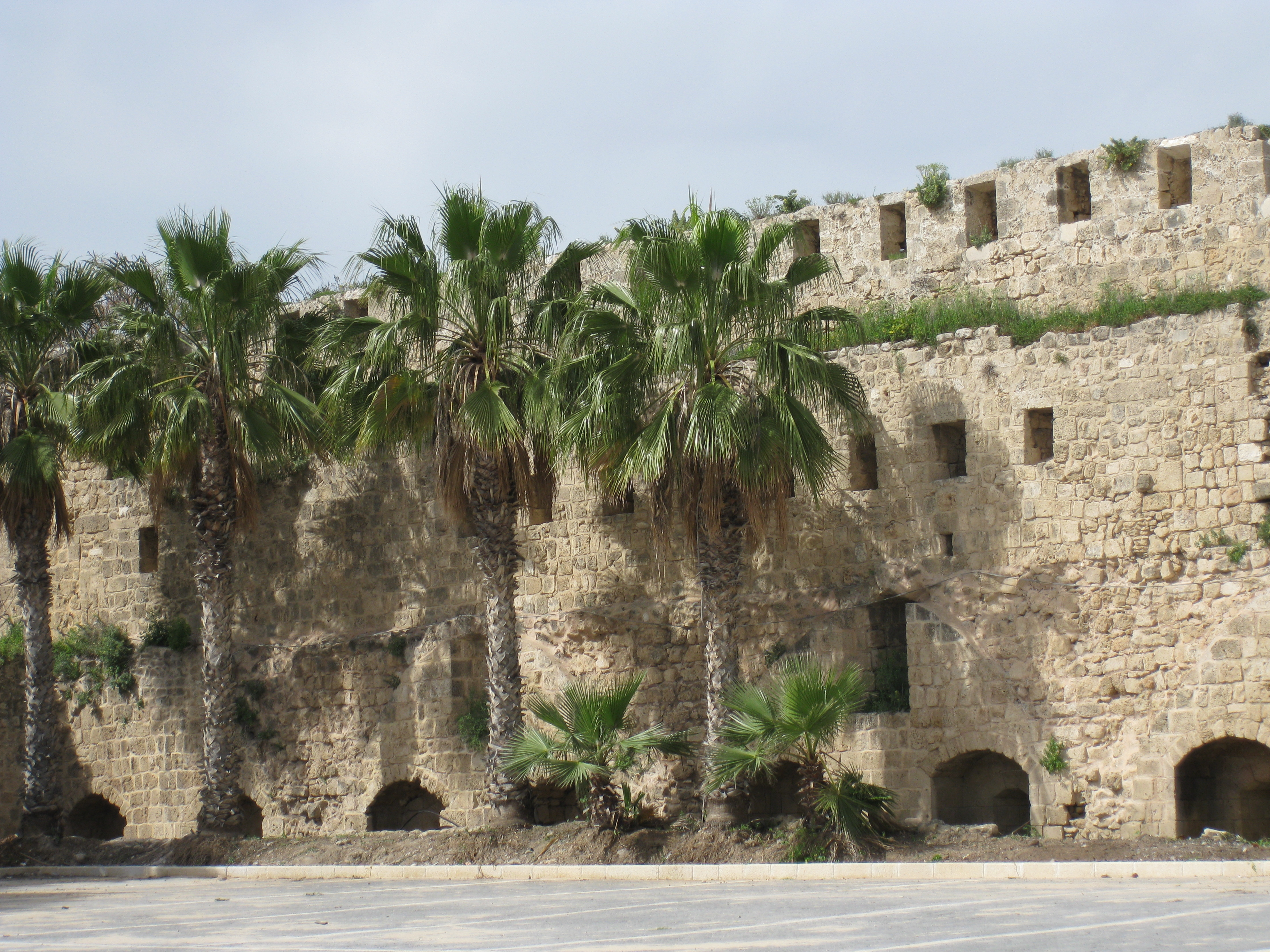 Acco (Acre, Akko) עכו